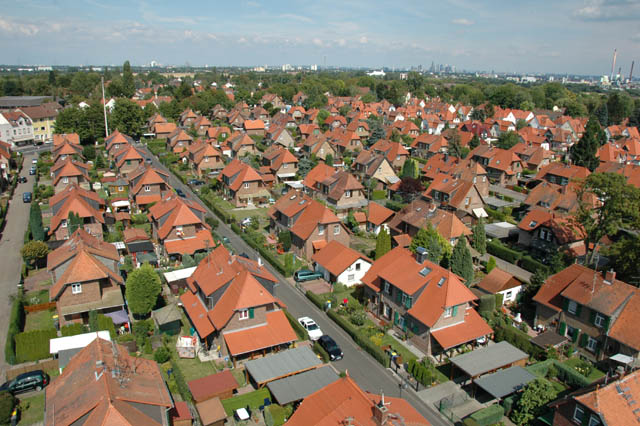 Colonie Zeilsheim – Aufnahme der Zeilsheimer Kolonie, im Vordergrund der Hildburghäuser Weg